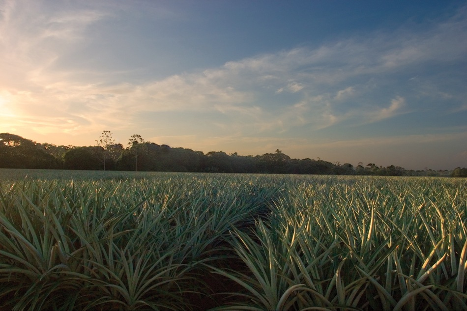 Llanuras de Sarapiquí